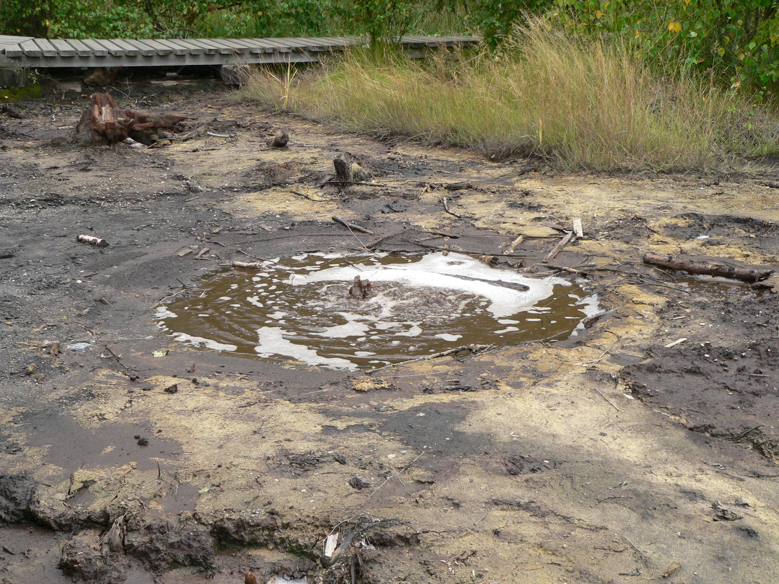 Mofette, Naturreservat Soos, Tschechische Republik